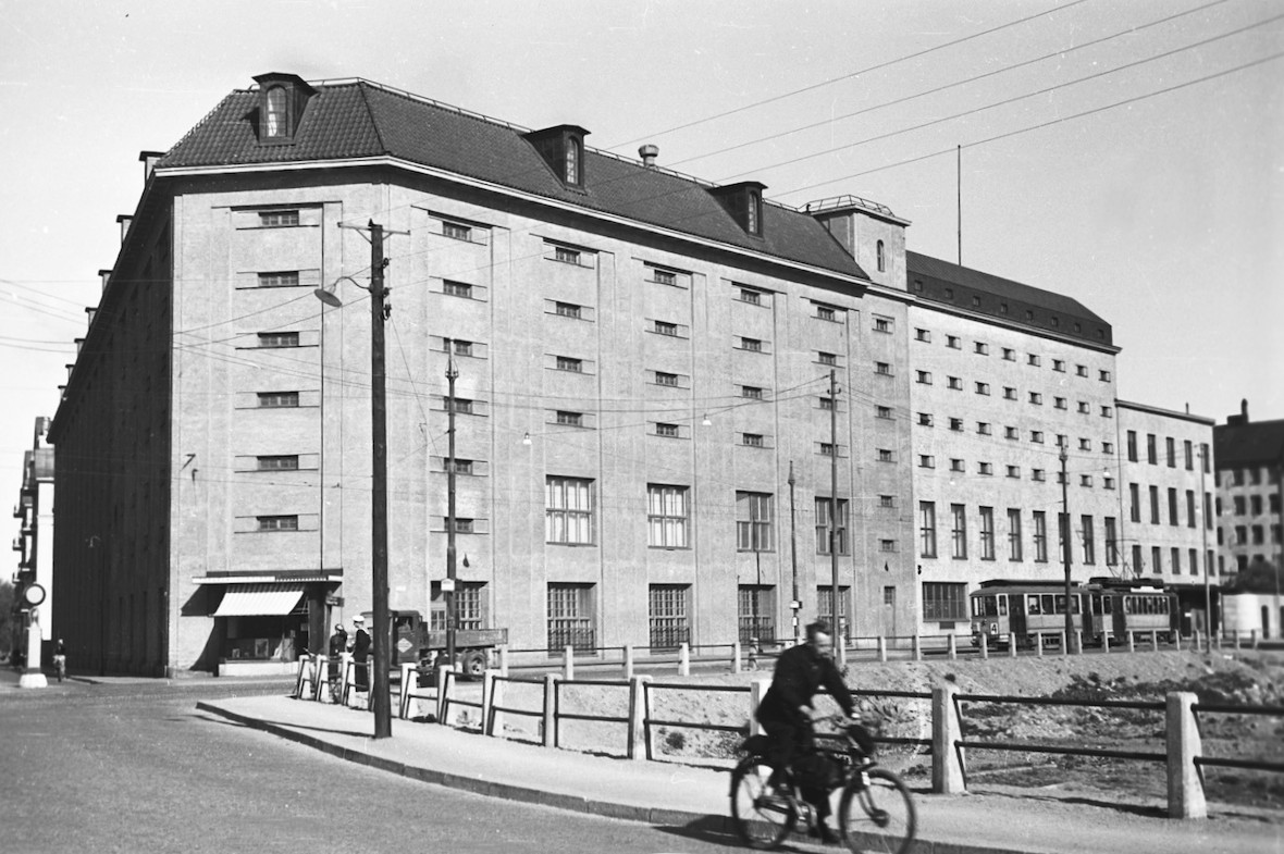 Tobaksmonopolets fabriksanläggning (magasinsbyggnaden)